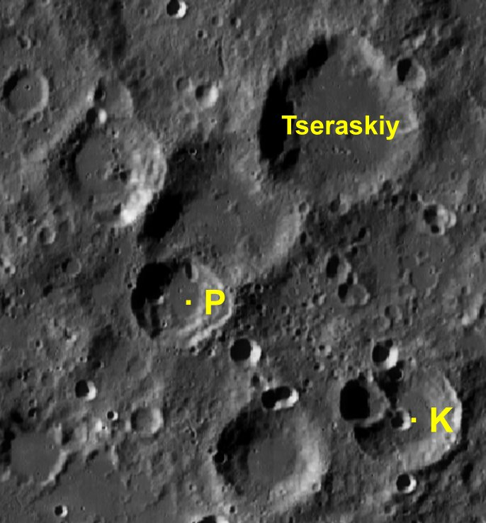 Cráter lunar Tseraskiy. Cráteres satélite. (Imagen LRO)